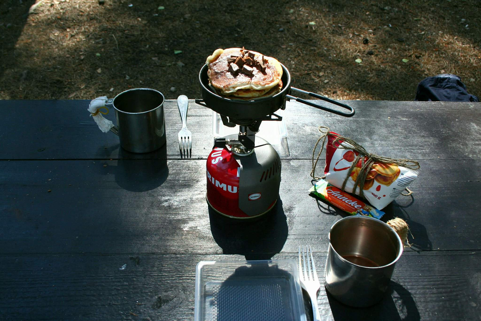 Välitingimustes pannkookide valmistamine priimusega.